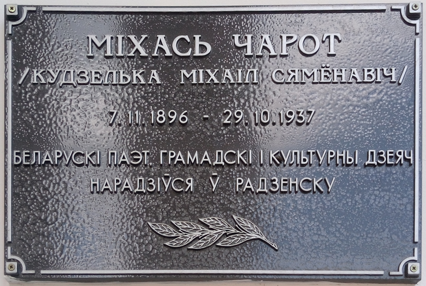 Памятная таблічка на доме культуры ў гонар беларускага паэта Міхася Чарота.